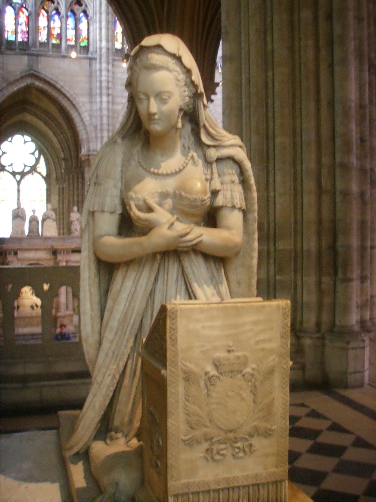 Basilica_di_saint_Denis tomba_di_maria_antonietta Paris